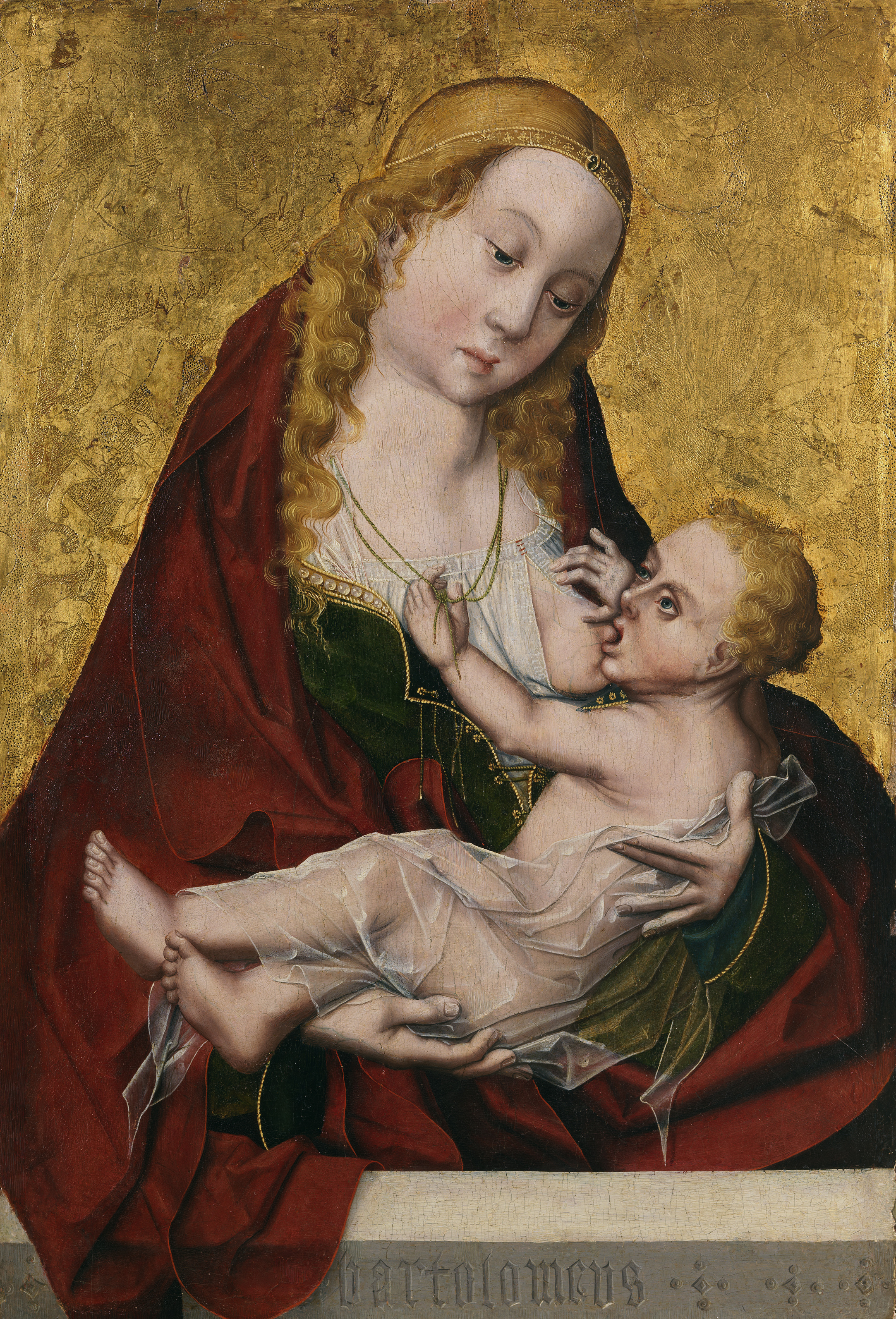 La obra representa a la Virgen María amamantando a su hijo, el Niño Jesús.